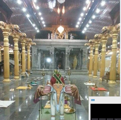 புனர்நிர்மானத்தின்பின்மூலஸ்தானவாயில்